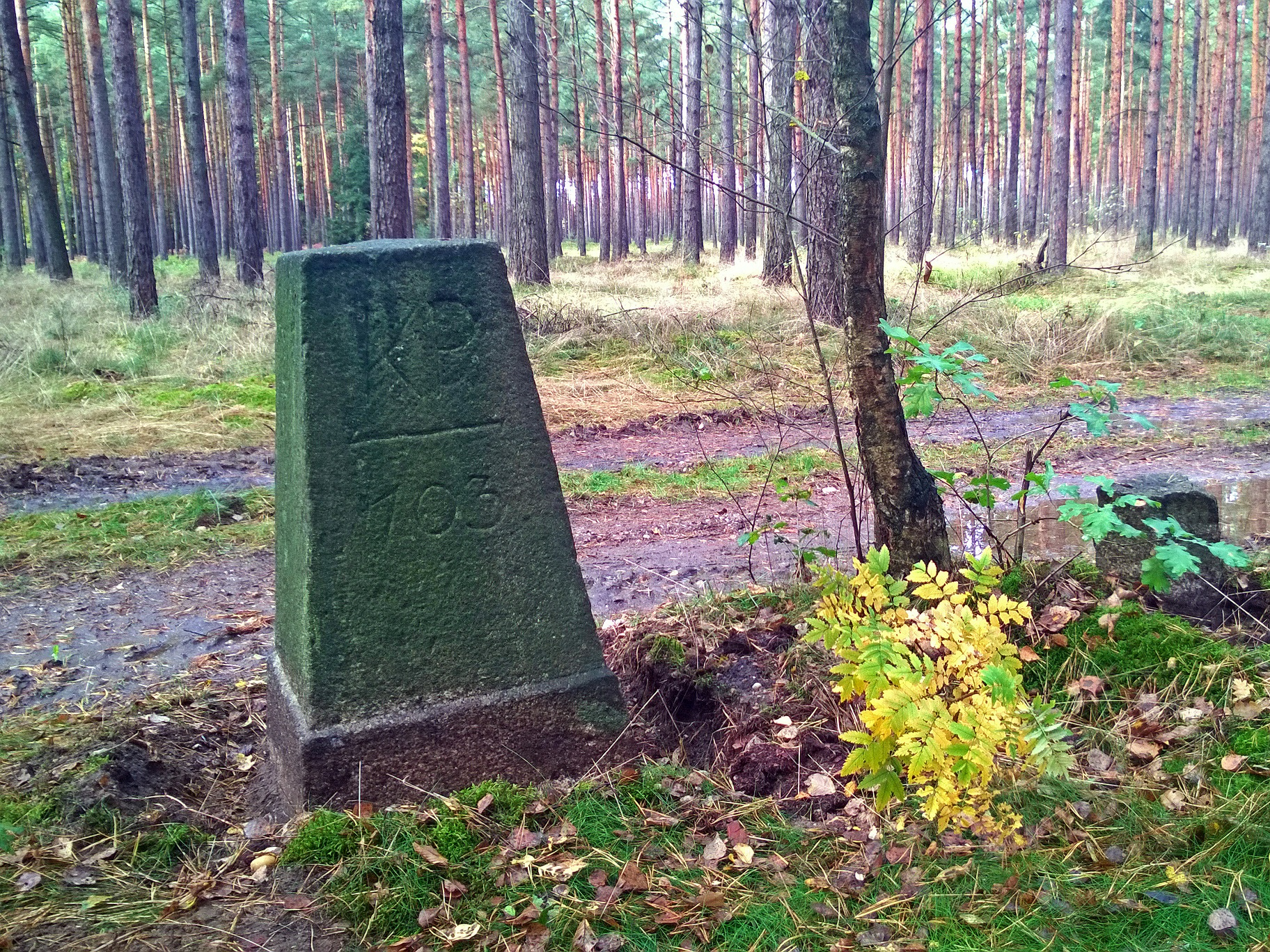 Grenzstein Nr. 103 und lokaler Grenzstein - Historische Landesgrenze Königreich Sachsen Königreich Preußen 1815 (Wiener Kongress) Hornjoserbsce: Historiski saksko-pruski měznik čo. 103 mjez Jeńšecami a Psowjami